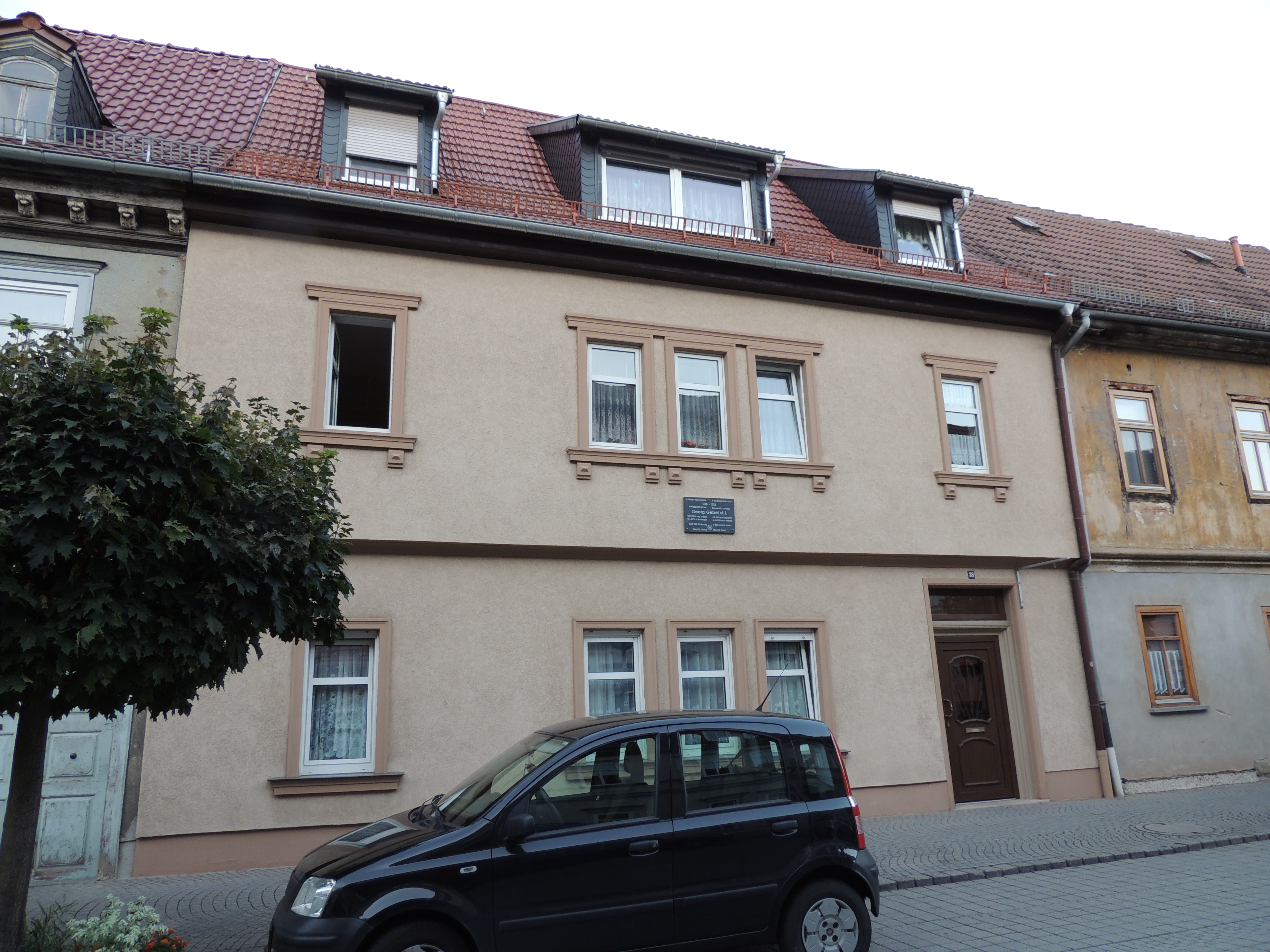 Wohnhaus des Komponisten Georg Gebel d. J. in der Schillerstraße 38 Rudolstadt